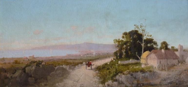 Forse l'opera presentata nel 1872 alla mostra di Brera a Milano